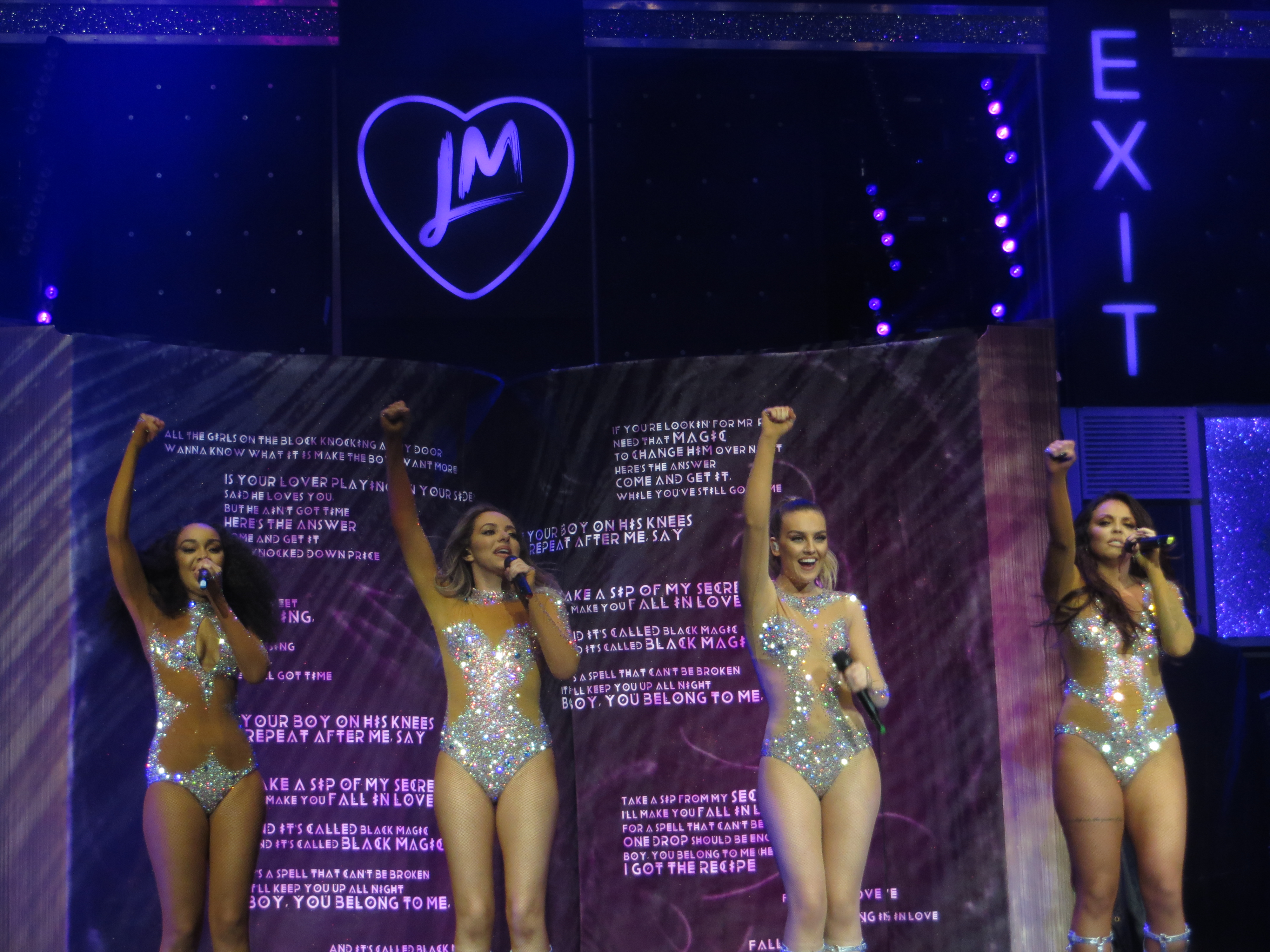 Little Mix 1